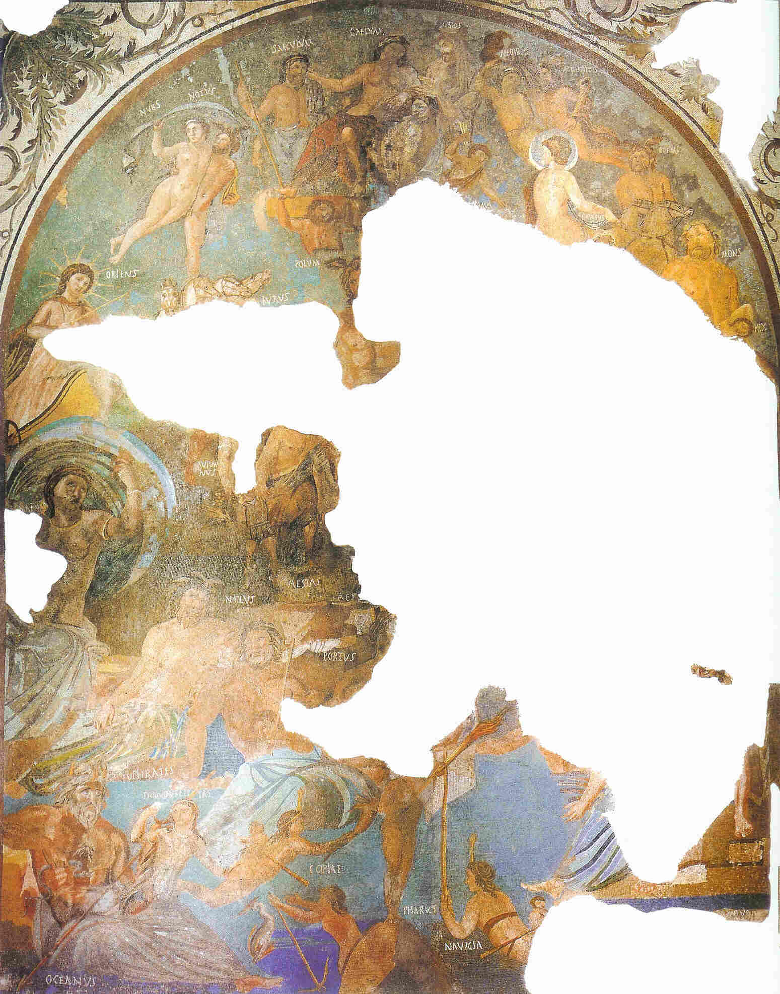 Mosaico perteneciente a la Casa de Mitreo en Mérida